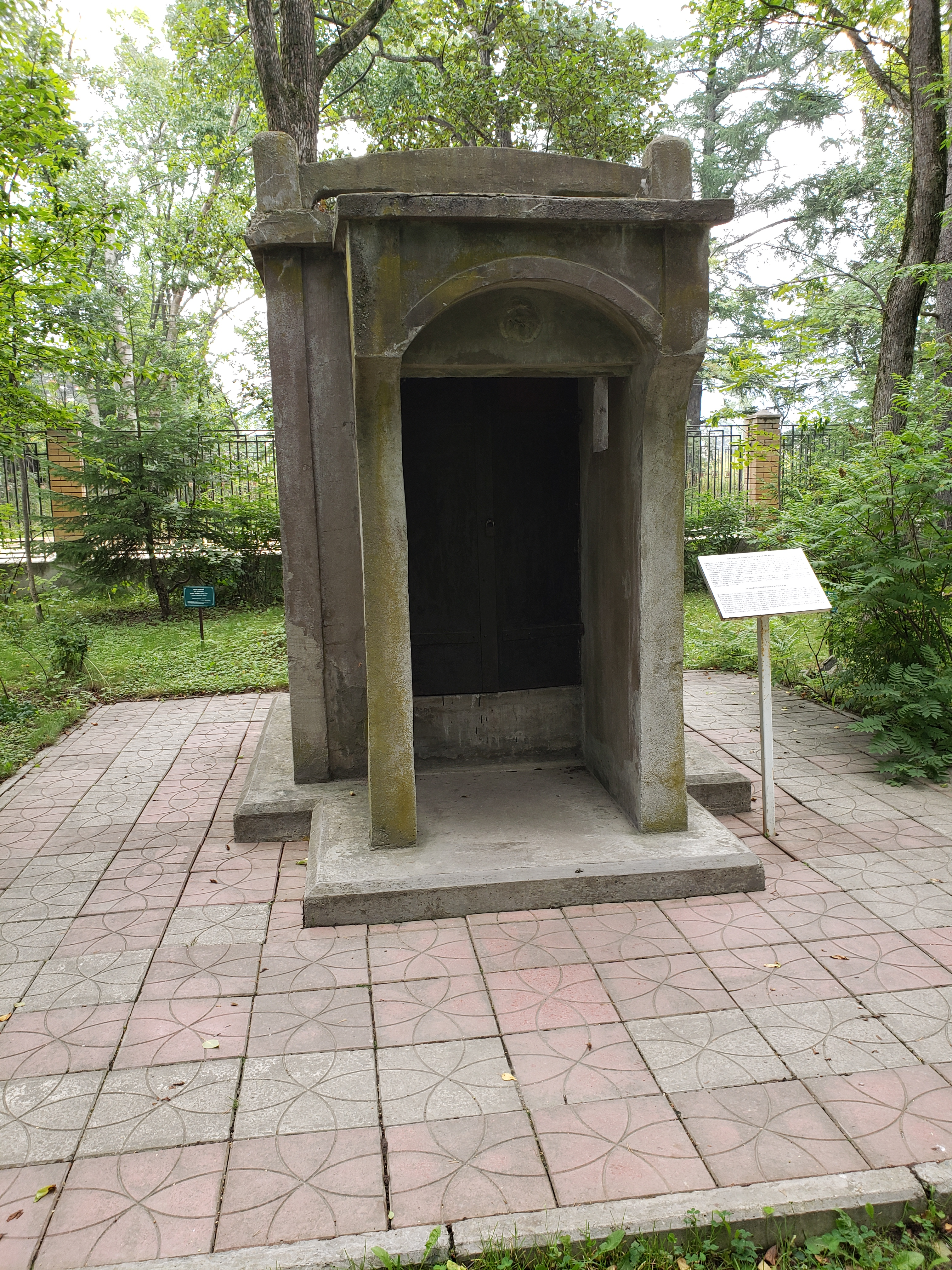 サハリン州郷土博物館にある移設された戦前の奉安殿。